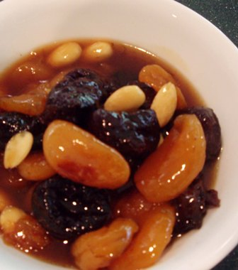 الطرشانة